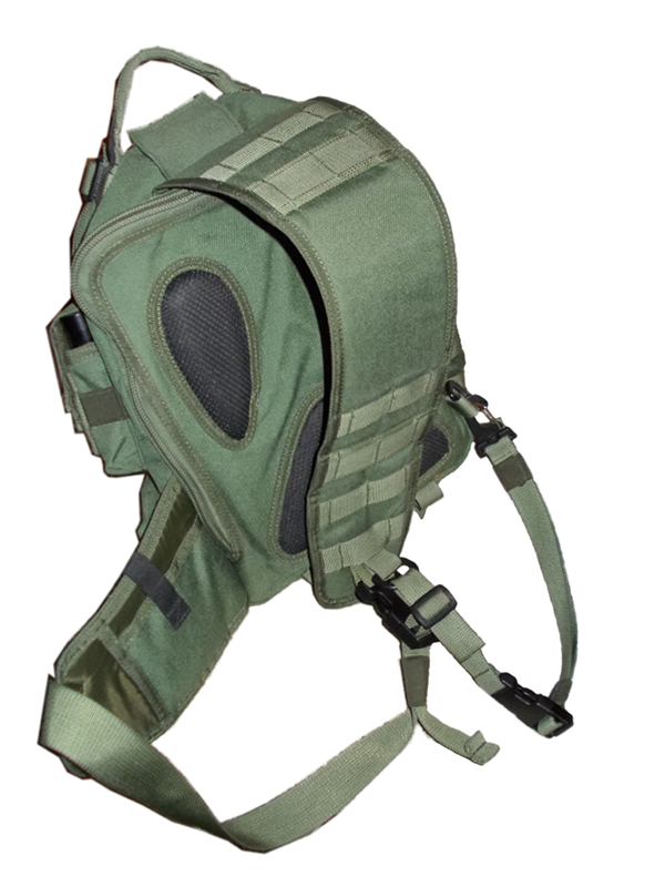 Подвесная система однолямочного рюкзака, один из вариантов.